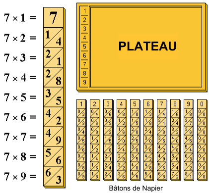 Batons de Napier (Napier set of rods)